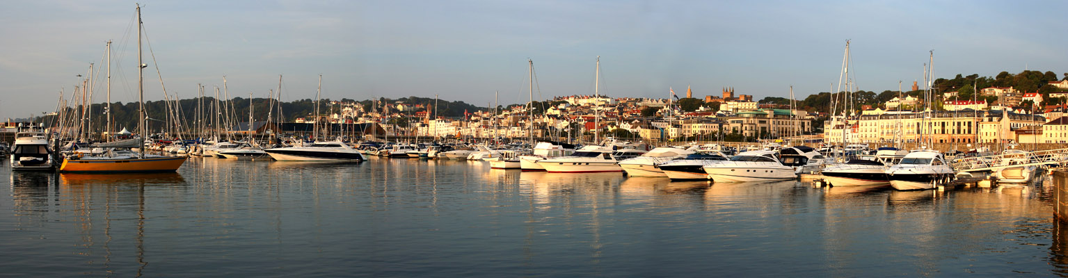 QE2 Marina, St. Peter Port